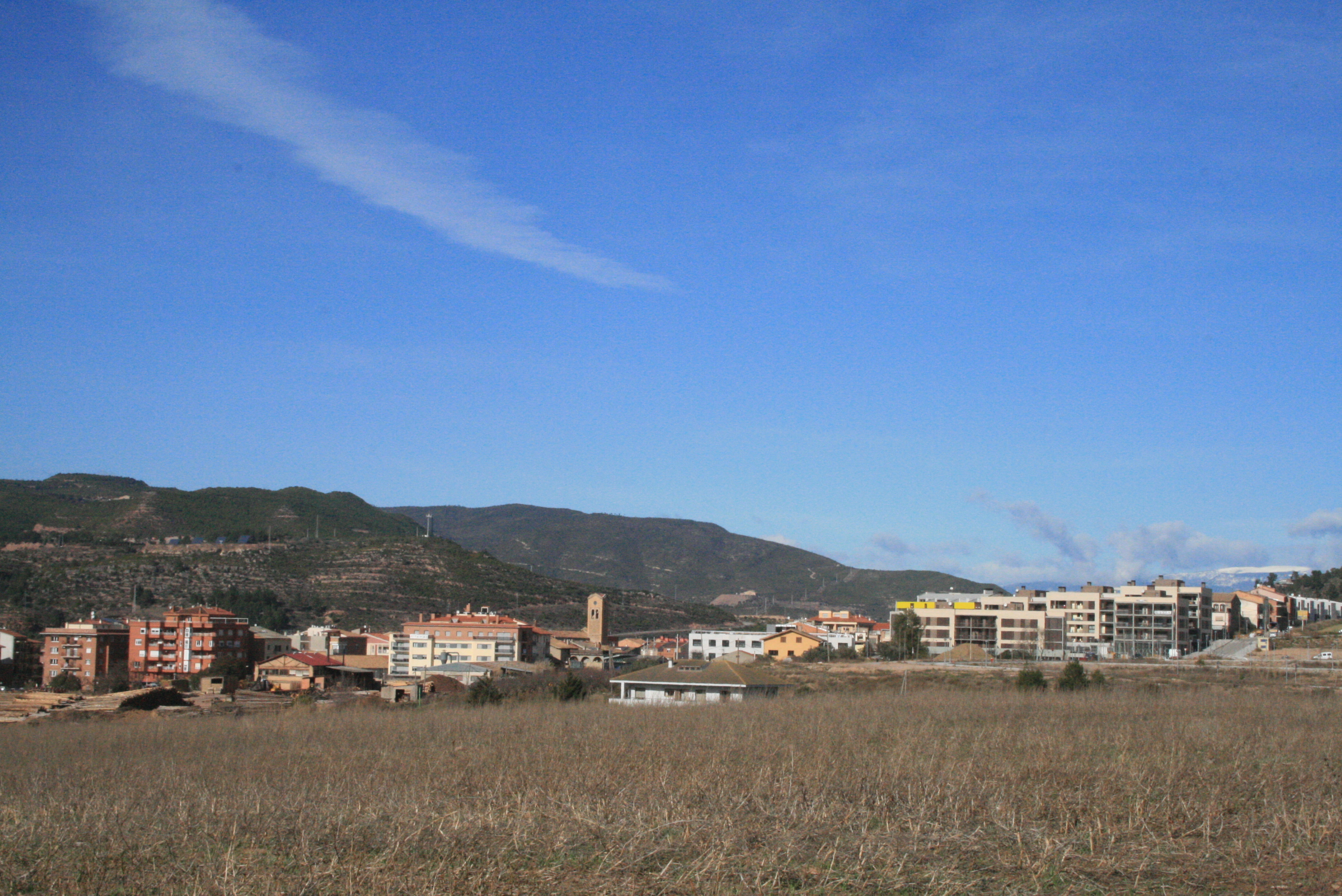 Callús